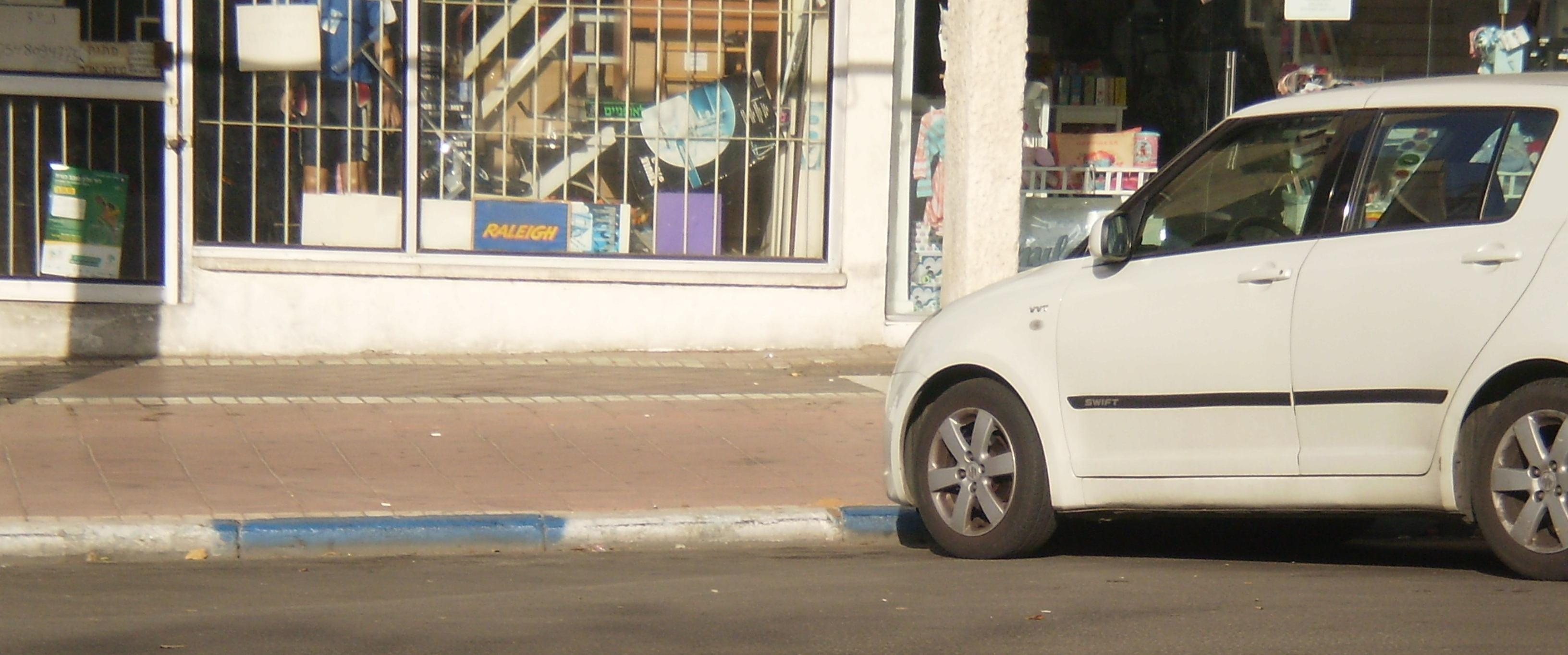 שולי מדרכה צבועים בכחול-לבן, לציון חניה בתשלום